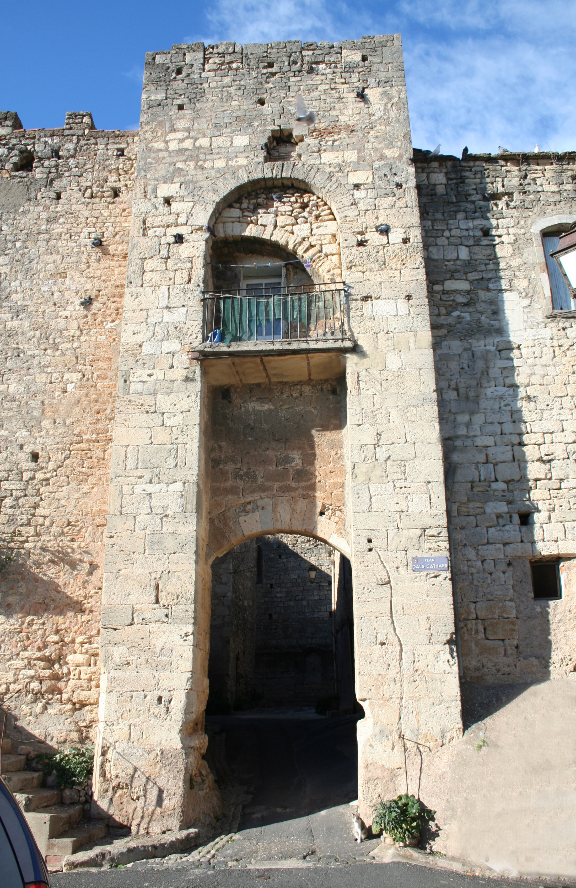 Puisserguier (Hérault) - entrée du château.